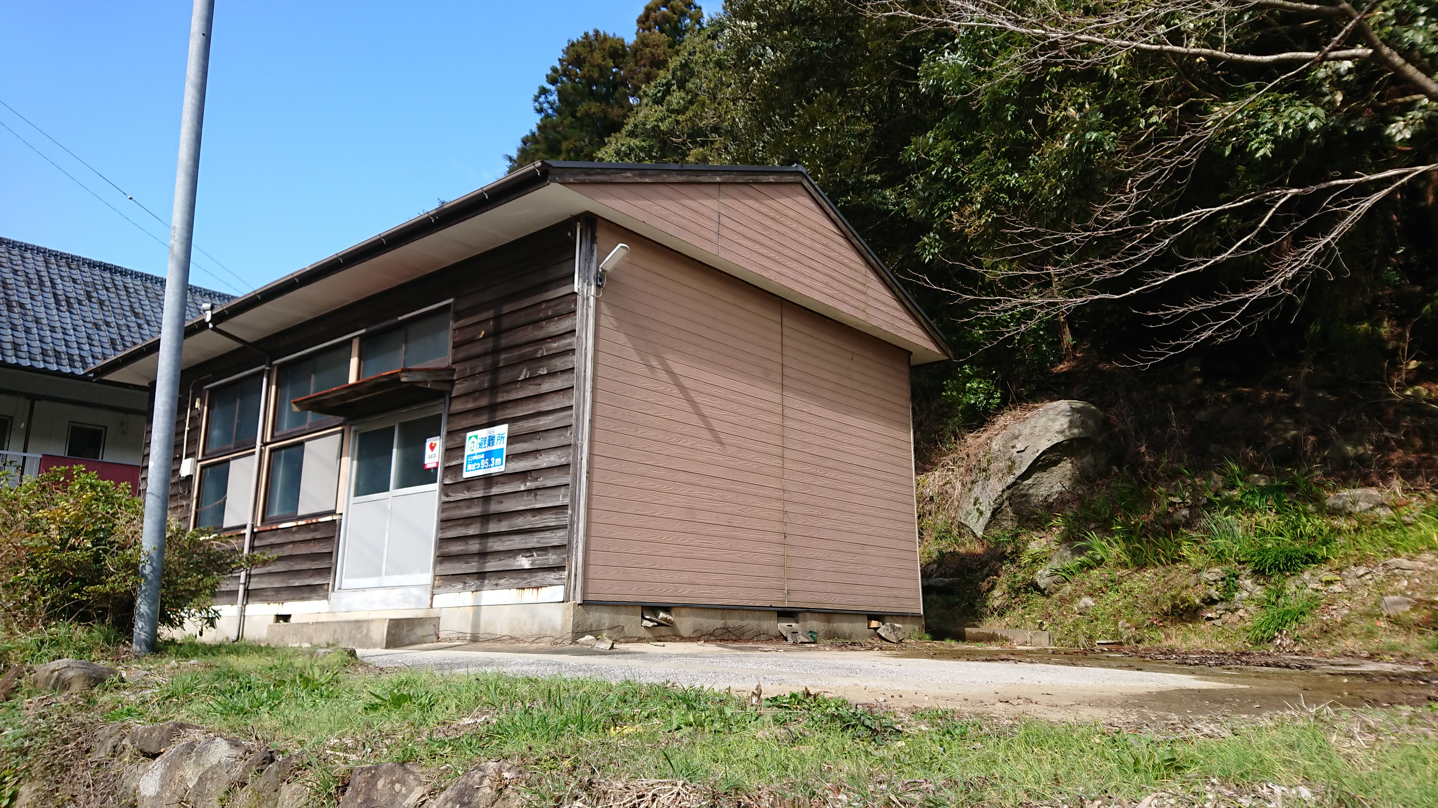 厳原町立（現・対馬市立）金田小学校日掛分校跡地。現在は日掛公民館敷地。